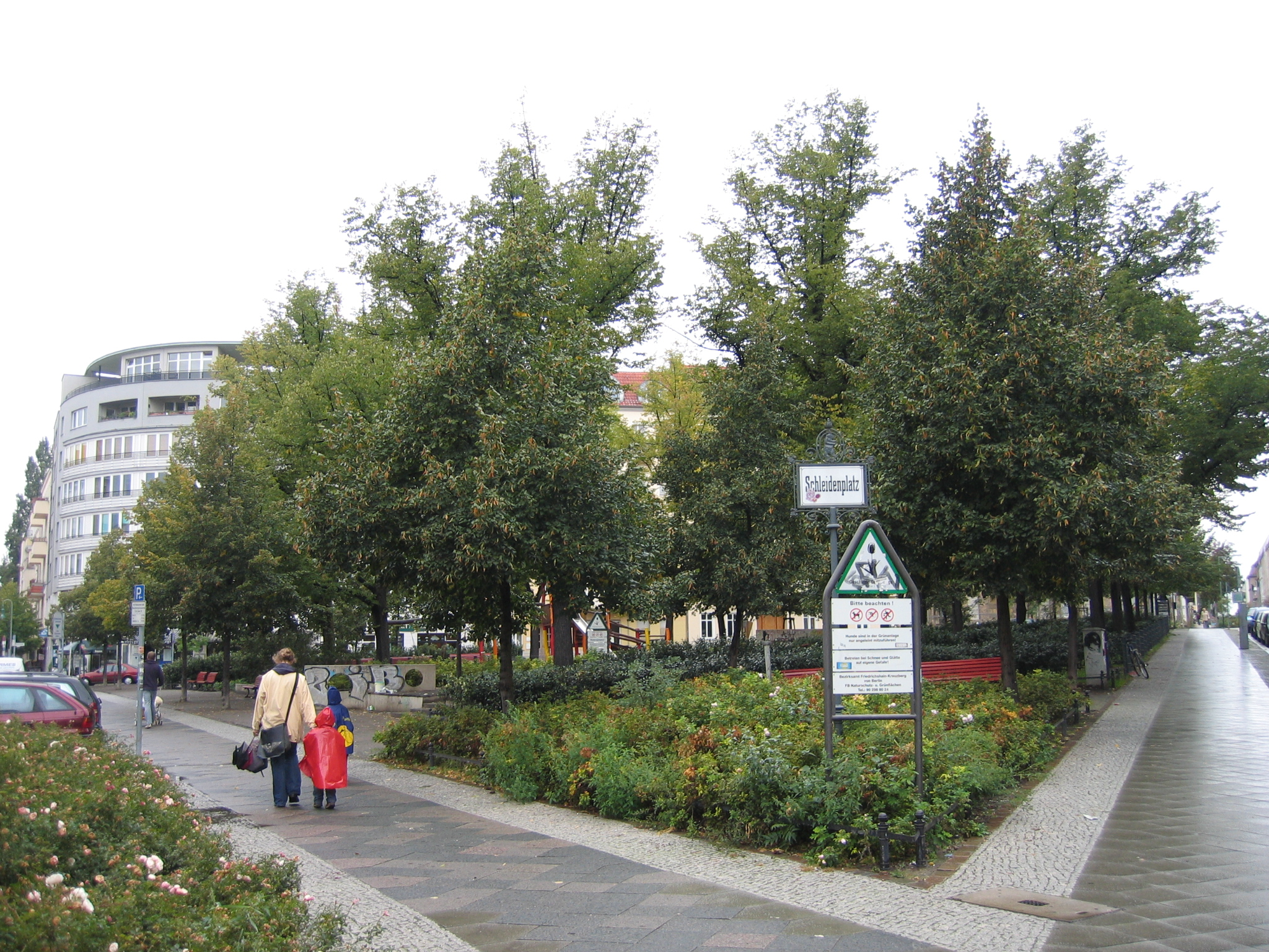 Schleidenplatz, Berlin